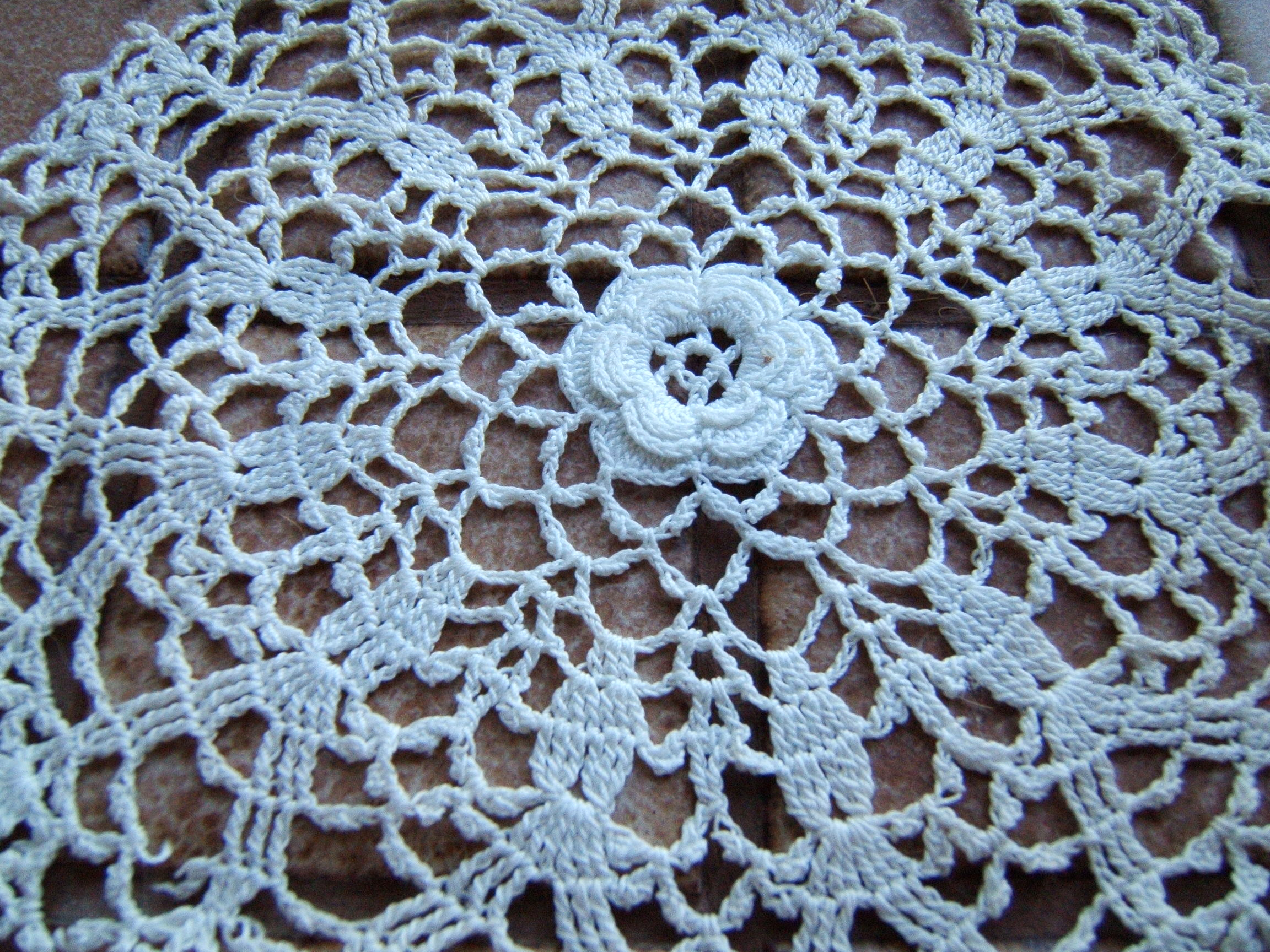 Supermacro-opname van fijn haakwerk, kleedje heeft een diameter van 14 cm.